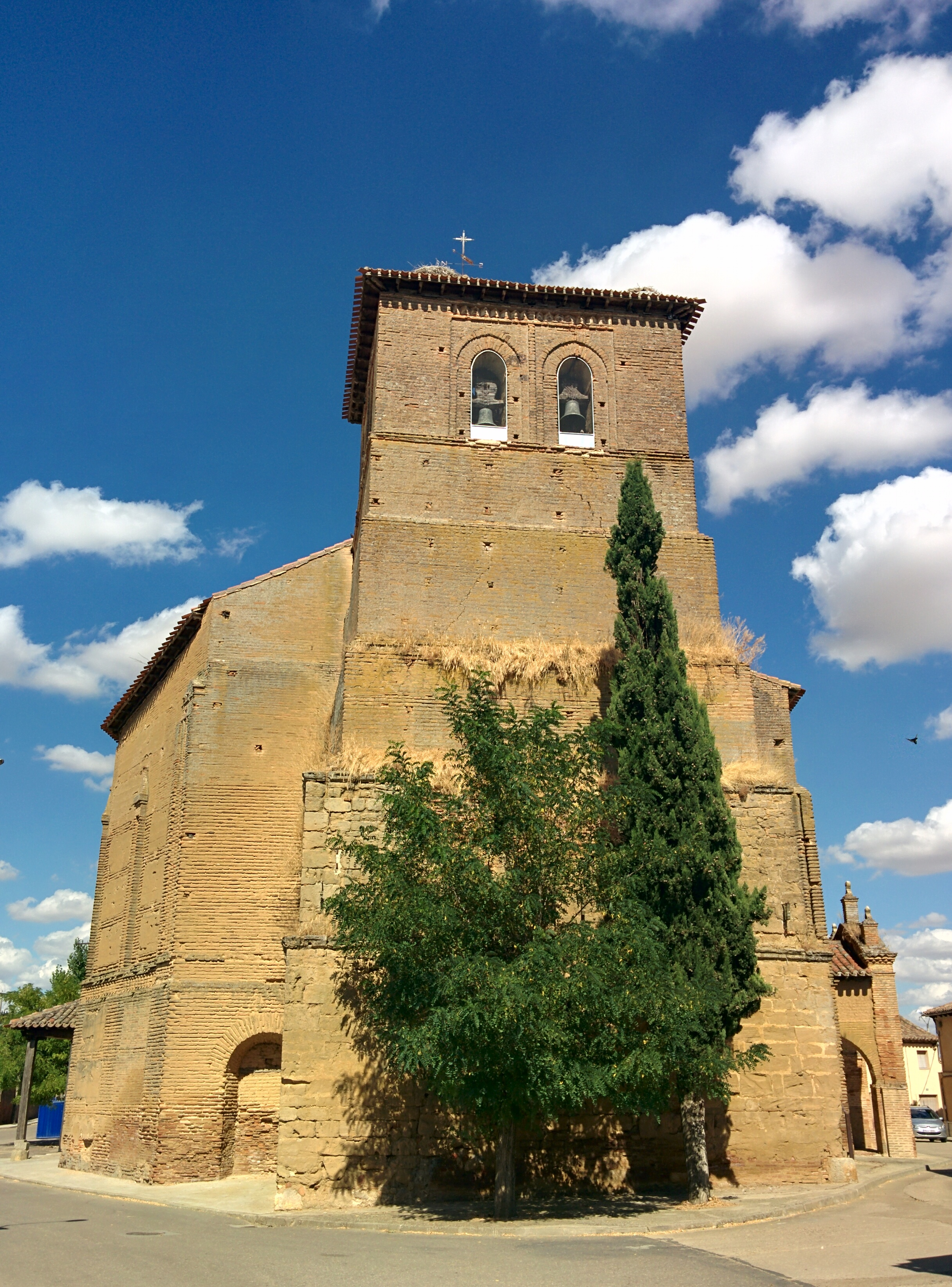 Iglesia del Salvador, en Boadilla de Rioseco (Palencia, España).